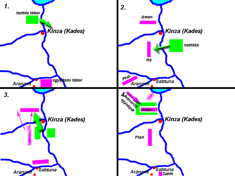 A kadesi csata lefolyásának térképe